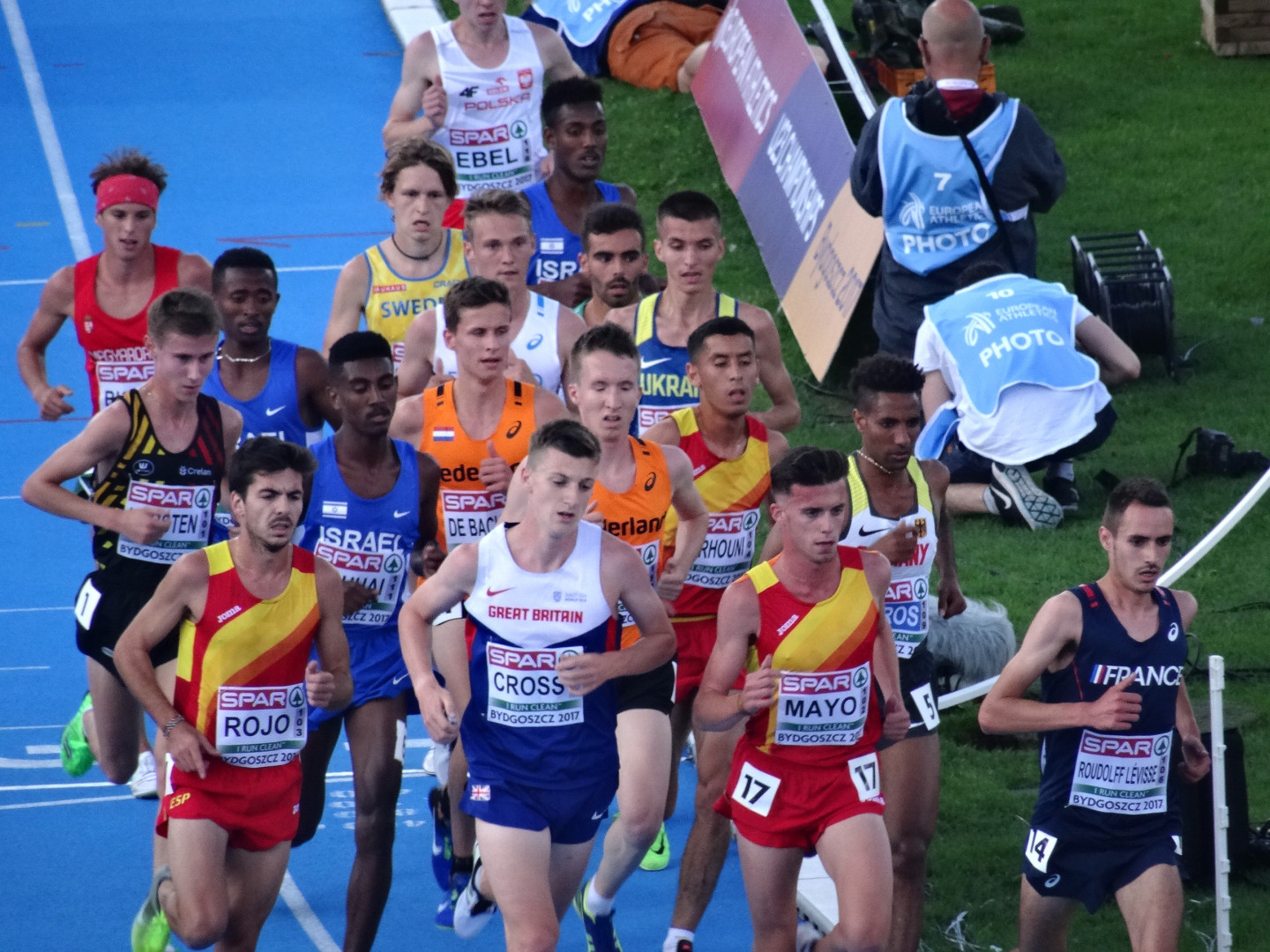 Młodzieżowe Mistrzostwa Europy w Lekkoatletyce U23 w Bydgoszczy 13-16 lipca 2017, finał biegu na 10 000 m mężczyzn